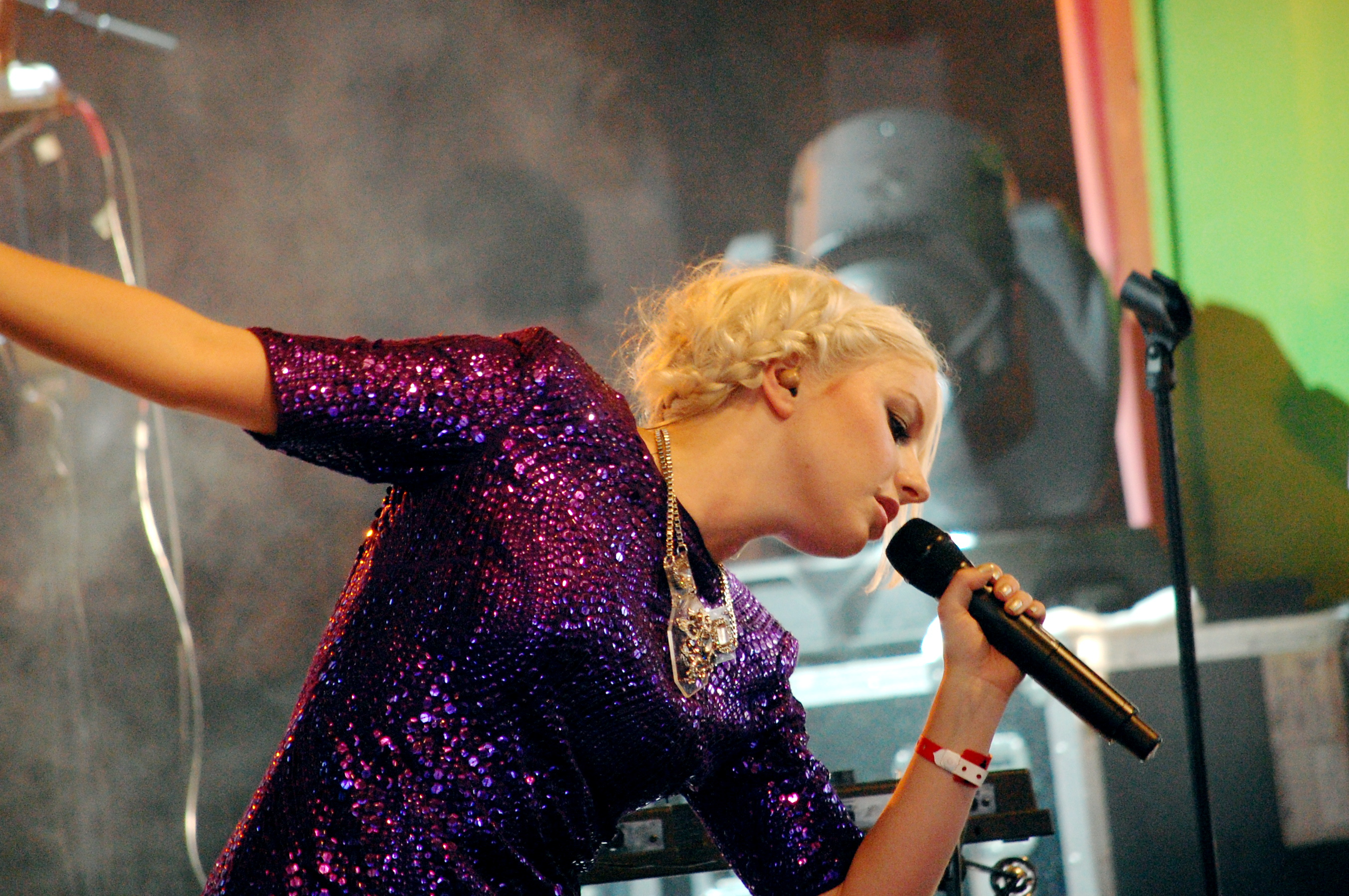 Little Boots